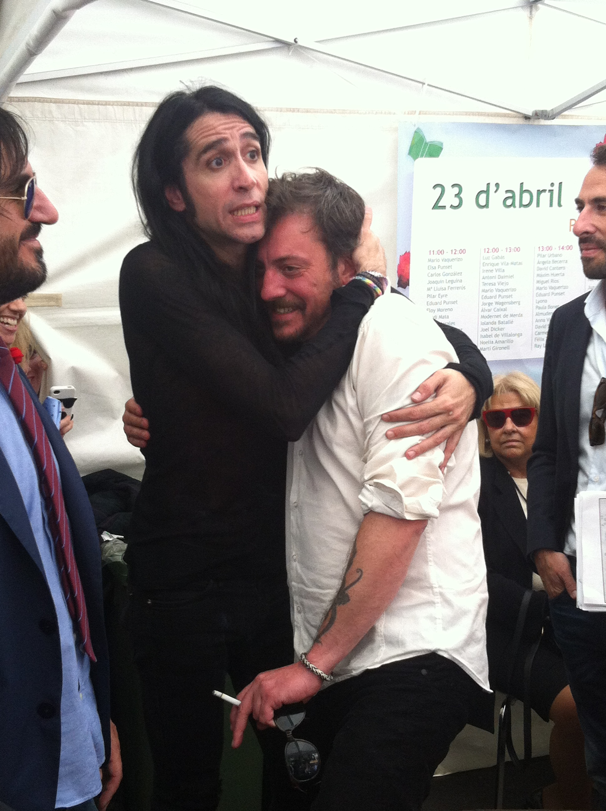 Diada de Sant Jordi 2014: Mario Vaquerizo Caro i Ray Loriga.